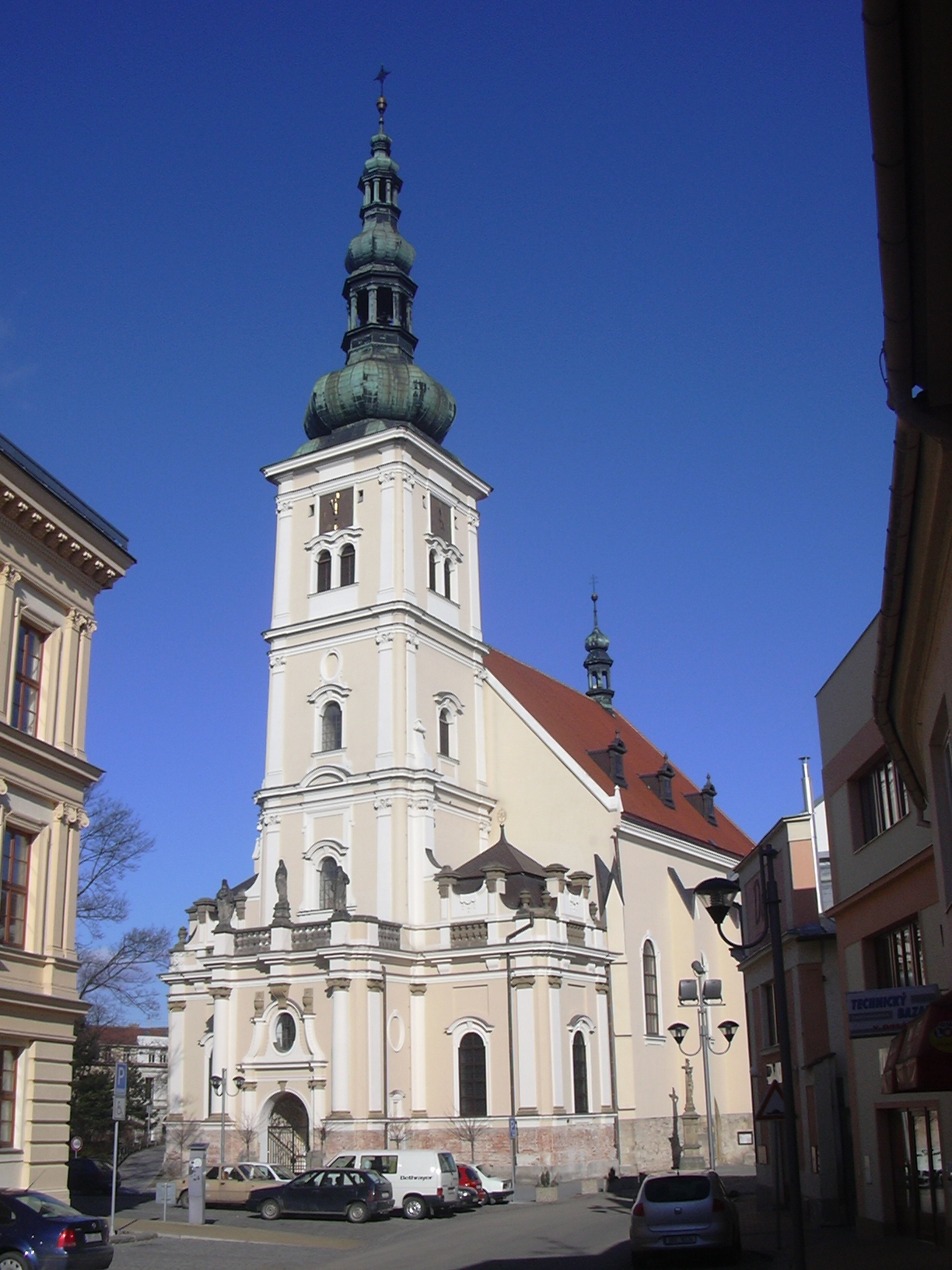 Kostel Nanebevzetí Panny Marie (Vyškov- czech republic)